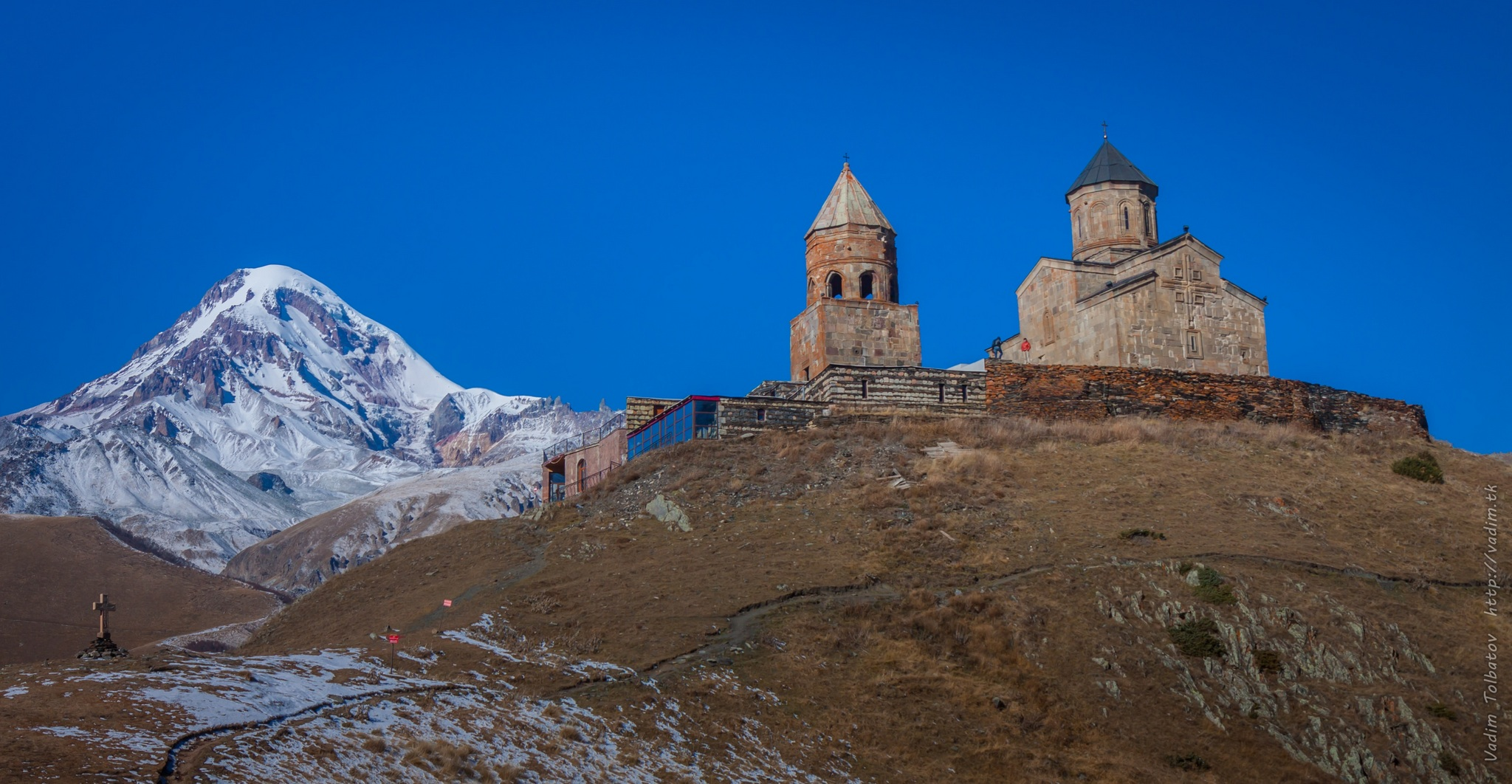 Троицкая церковь (Гергети, Грузия) на фоне Казбека